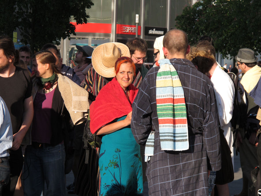 TOW3